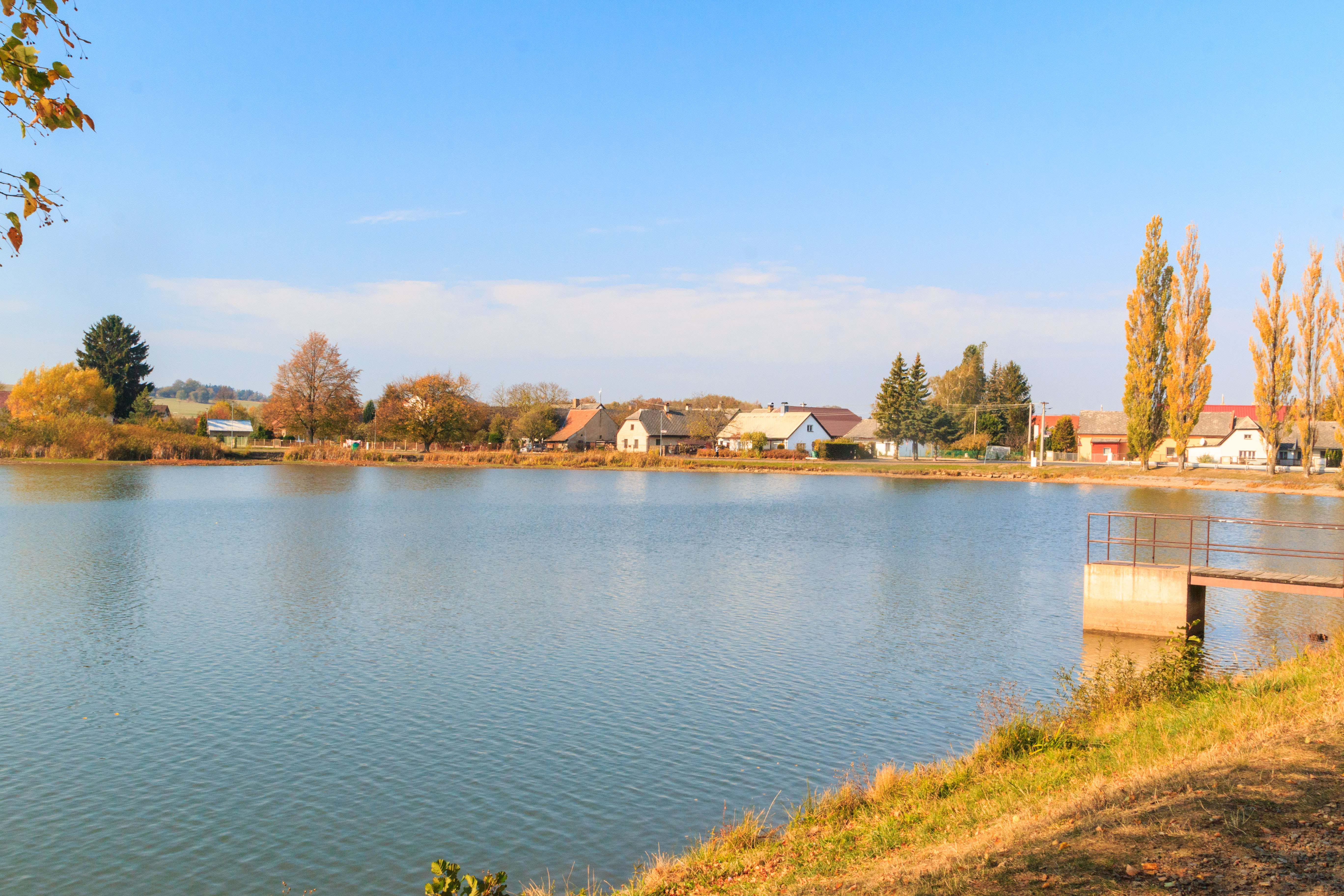 Horní rybník u Nasavrk Project: Vodstvo. Ticket: 1618.